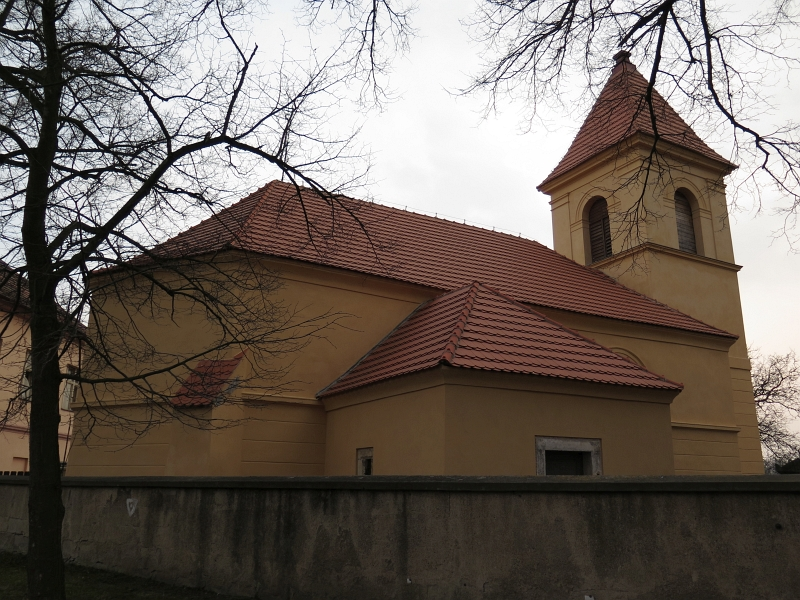 Kostel svatého Prokopa, Černěves.